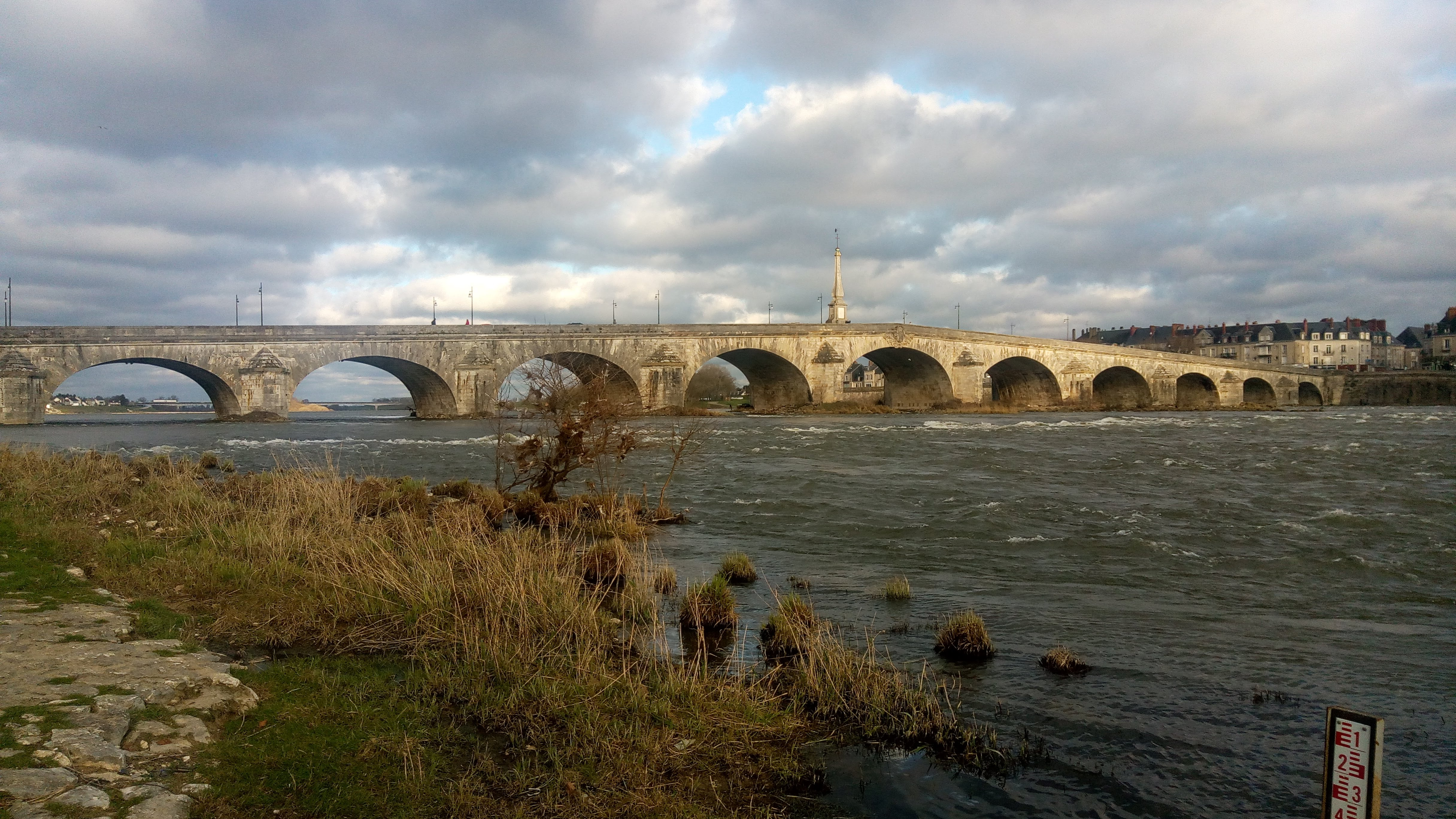 Pont Jacques-Gabriel à Blois, en Février 2020, inscrit en tant que monument historique.